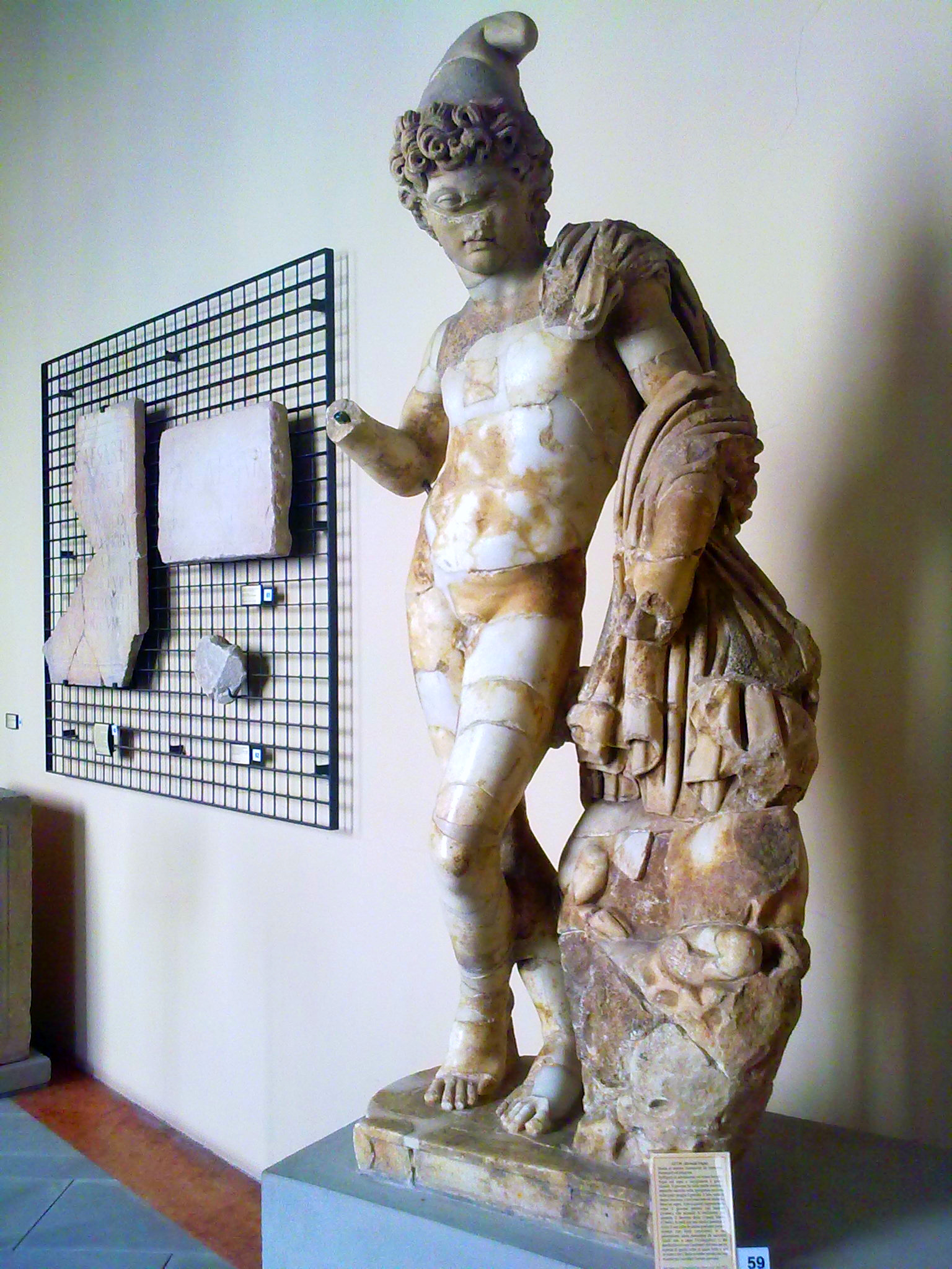 Attis, Museo Archeologico Nazionale di Sarsina